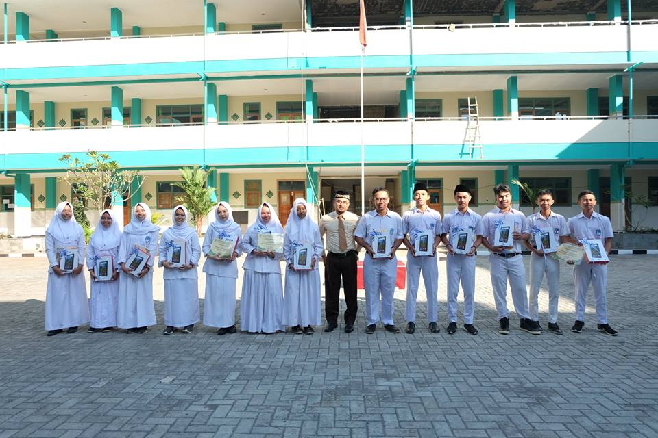 Penyerahan Penghargaan kepada Para Murid yang Berprestasi dalam Bidang Akademik maupun Non Akademik. Apresiasi yang diberikan oleh pihak yayasan dan sekolah berupa tablet.